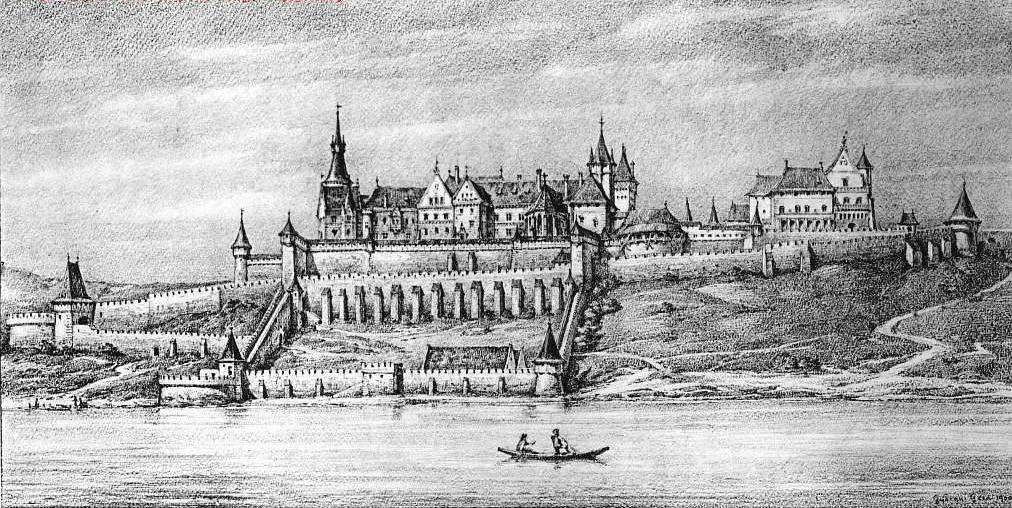 Györgyi Géza: Buda Mátyás király idejében : A Marsigli féle török fölvétel és régi metszetek nyomán (1900) grafikai, Hauszmann Alajos. A magyar királyi vár építésének története, Bp. : Pátria, 1900. t. XI.